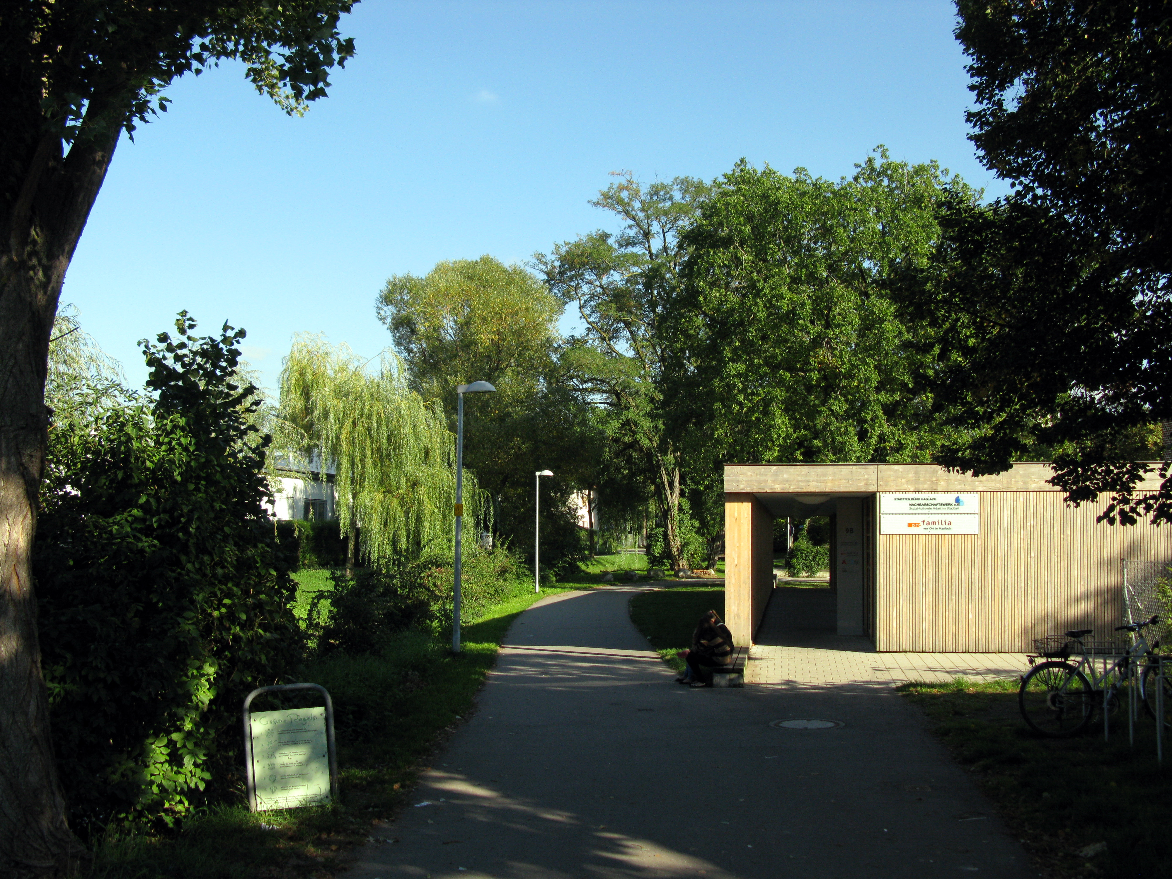 Am Dorfbach in Freiburg-Haslach mit Stadtteilbüro